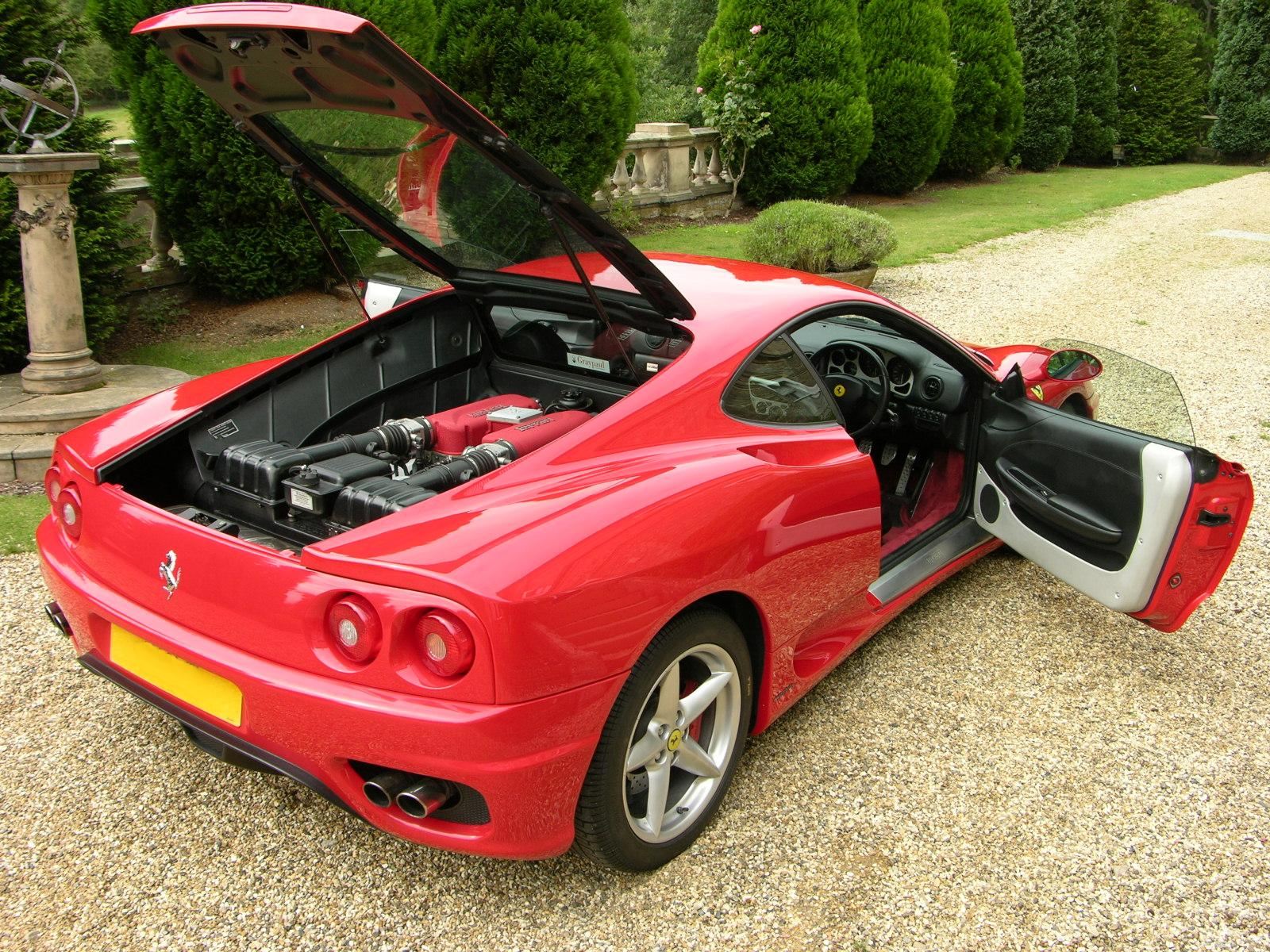 Ferrari F360 Modena